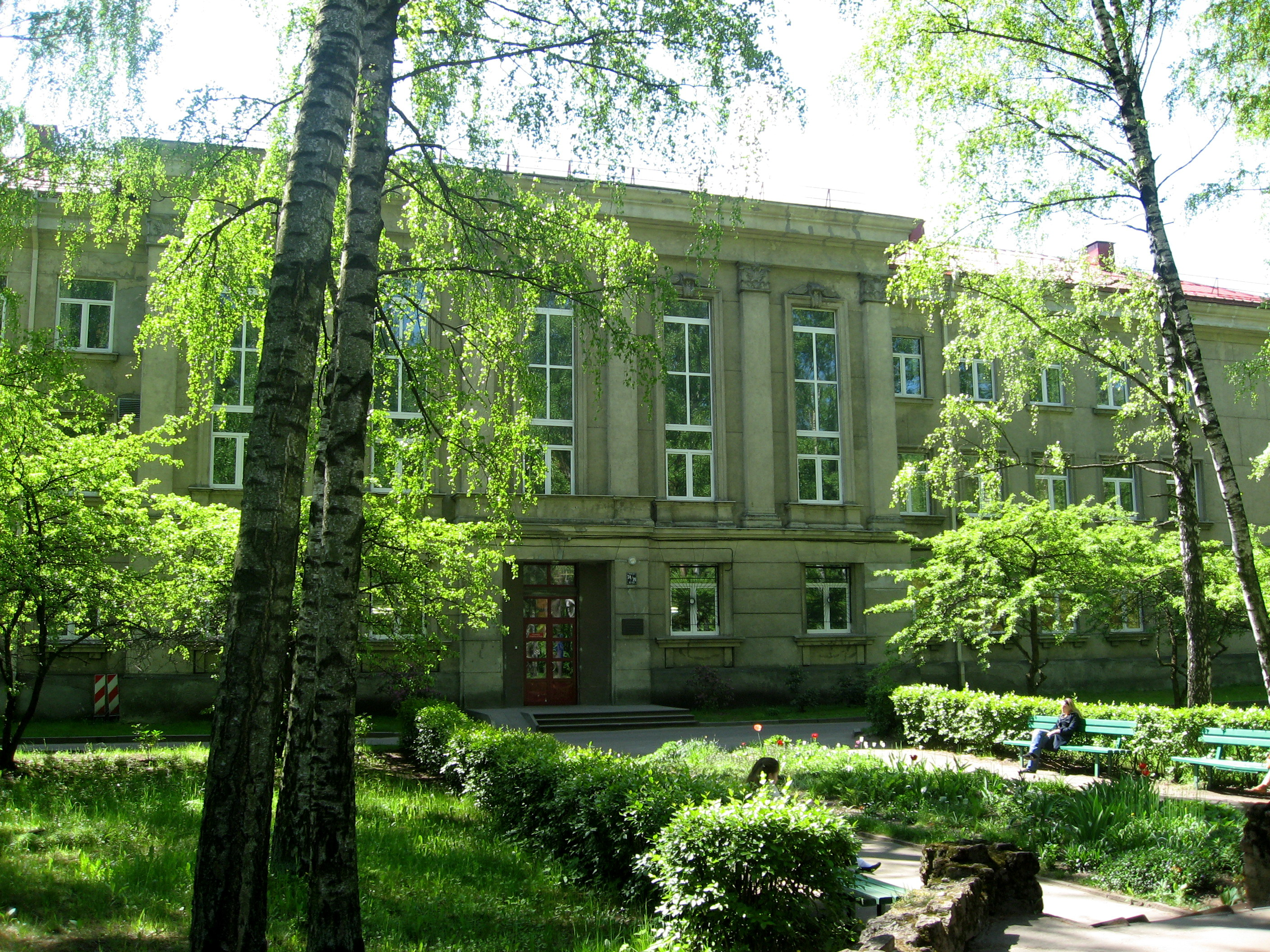 Fakulta pedagogiky a psychologie Lotyšské univerzity